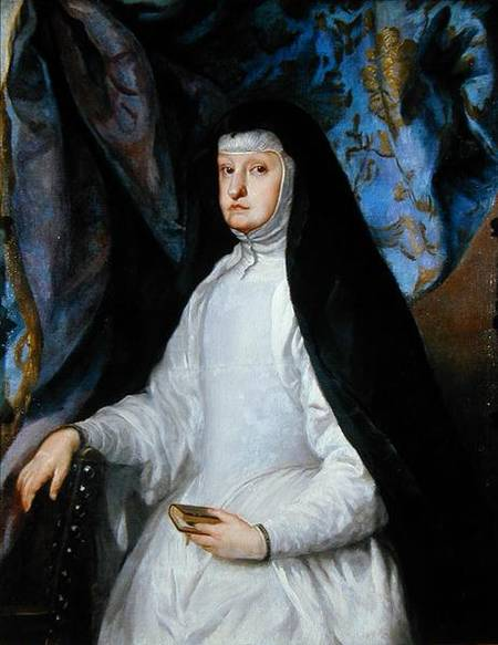 La reina madre Mariana de Austria (1634-1696), segunda esposa del rey Felipe IV de España y madre de Carlos II.